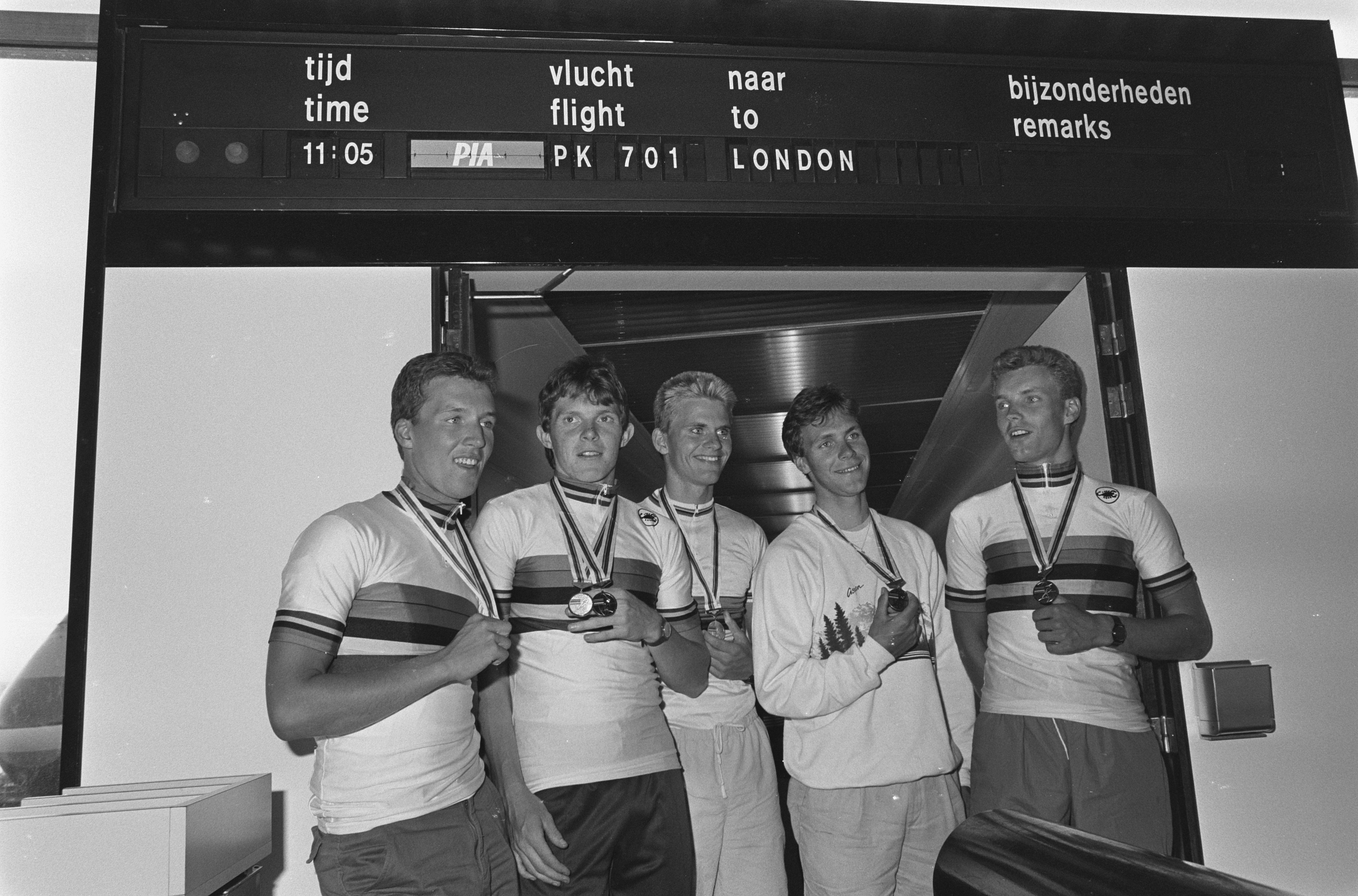 Collectie / Archief : Fotocollectie Anefo Reportage / Serie : [ onbekend ] Beschrijving : Aankomst Nederlandse Amateurwielerploeg uit Colorado op Schiphol; vlnr: Tom Cordes , John Talen , G. de Vries Arjan Jagt en Rob Harmeling Datum : 9 september 1986 Trefwoorden : aankomsten, vliegvelden, wielrenners Persoonsnaam : G. De Vries, John Talen Instellingsnaam : Schiphol Fotograaf : Gerrits, Roland / Anefo Auteursrechthebbende : Nationaal Archief Materiaalsoort : Negatief (zwart/wit) Nummer archiefinventaris : bekijk toegang 2.24.01.05 Bestanddeelnummer : 933-7548